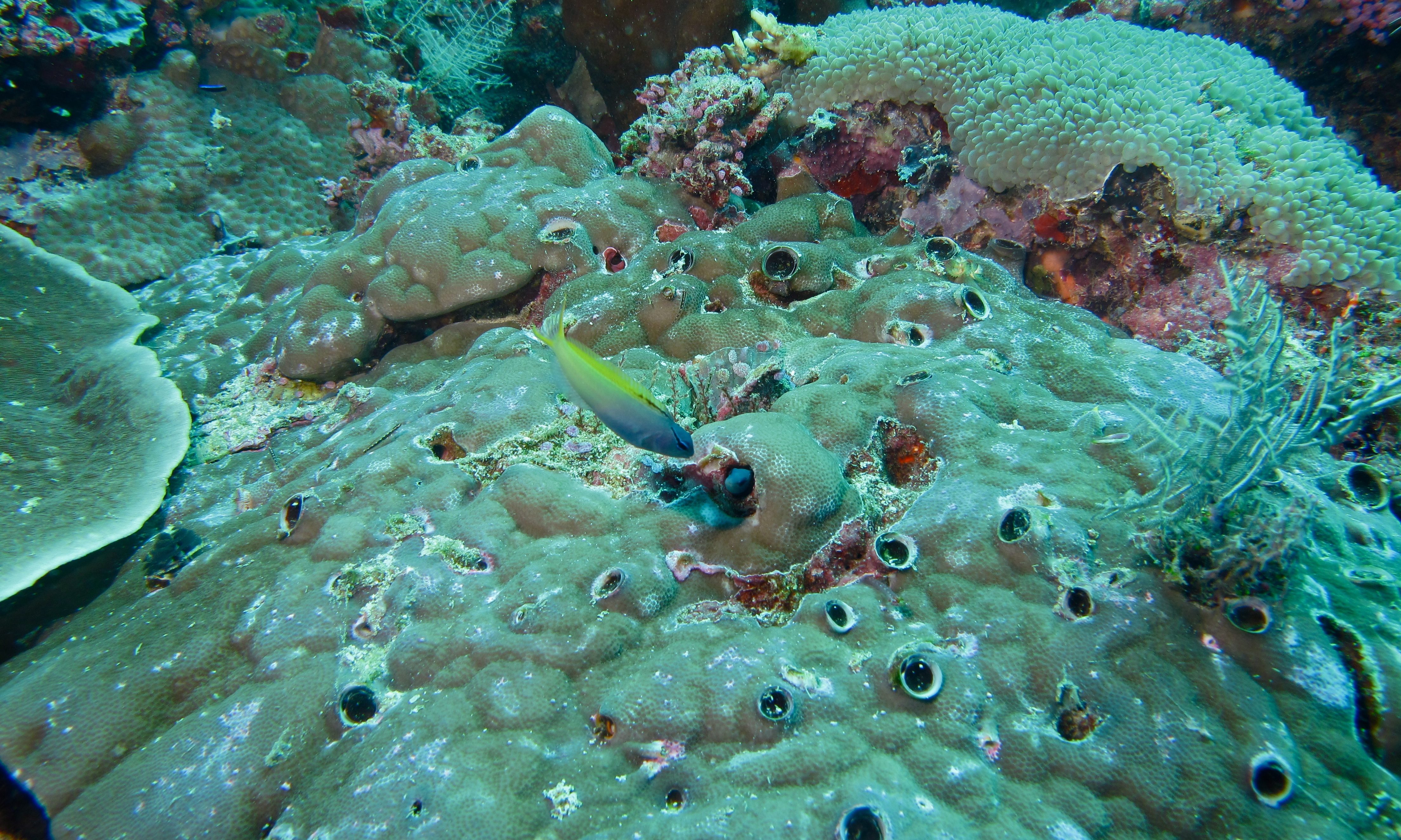 Hanging Gardens, Pulau Sipadan, Sabah, MALAYSIA